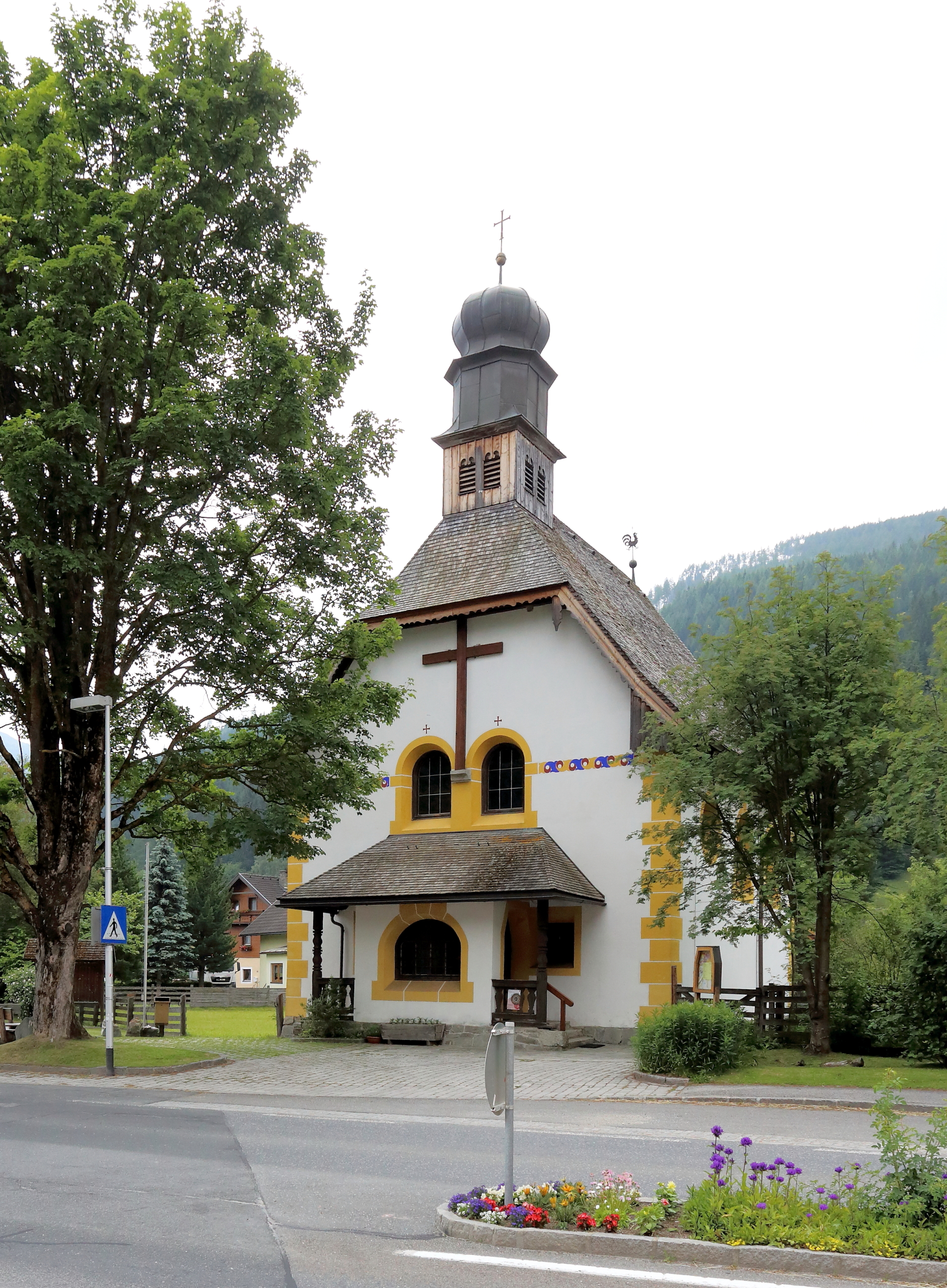 Katholische Filialkirche Herz Jesu in Oberweißburg, ein Ortsteil der in der Salzburger Gemeinde Sankt Michael im Lungau.